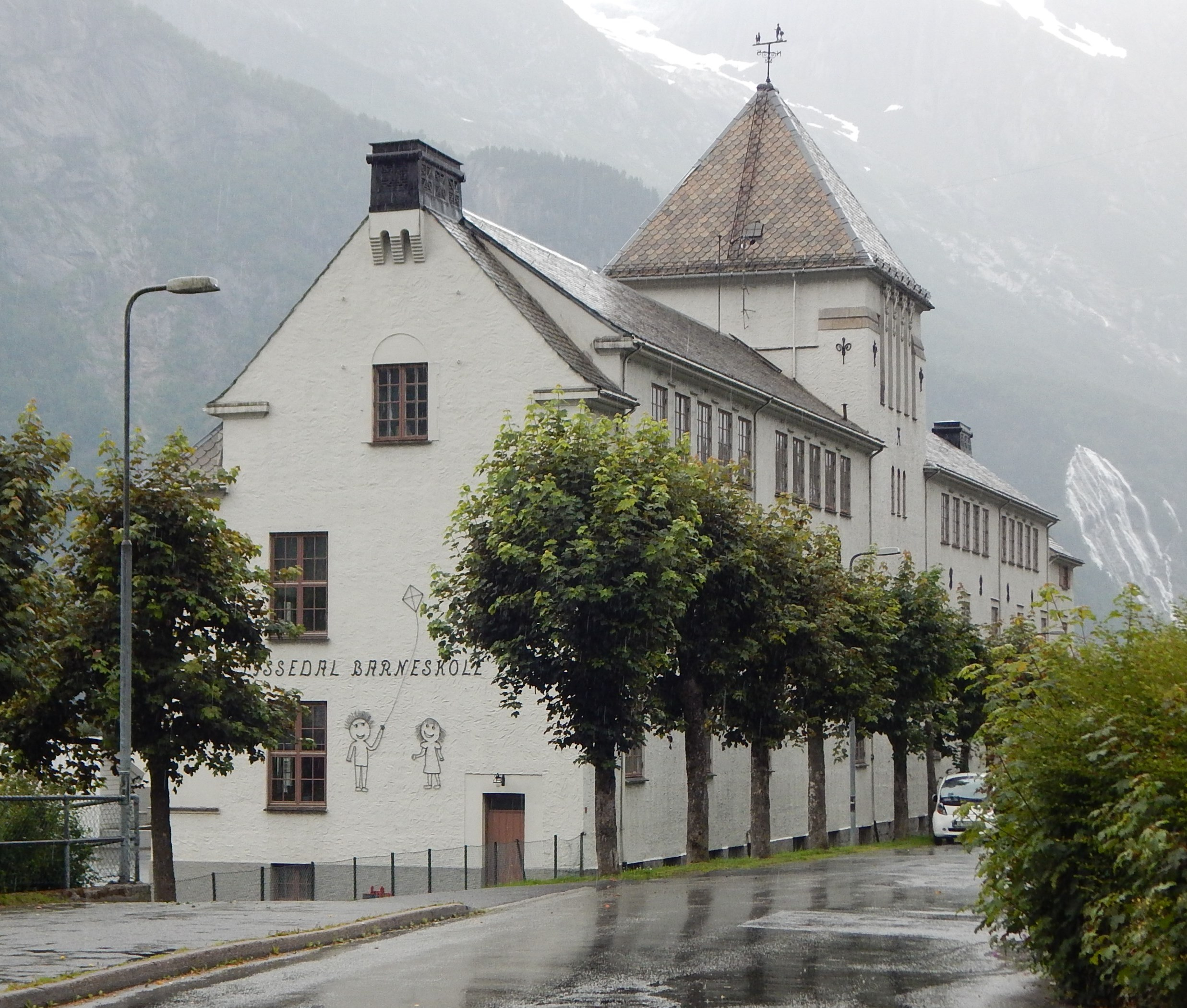 Tyssedal barneskole